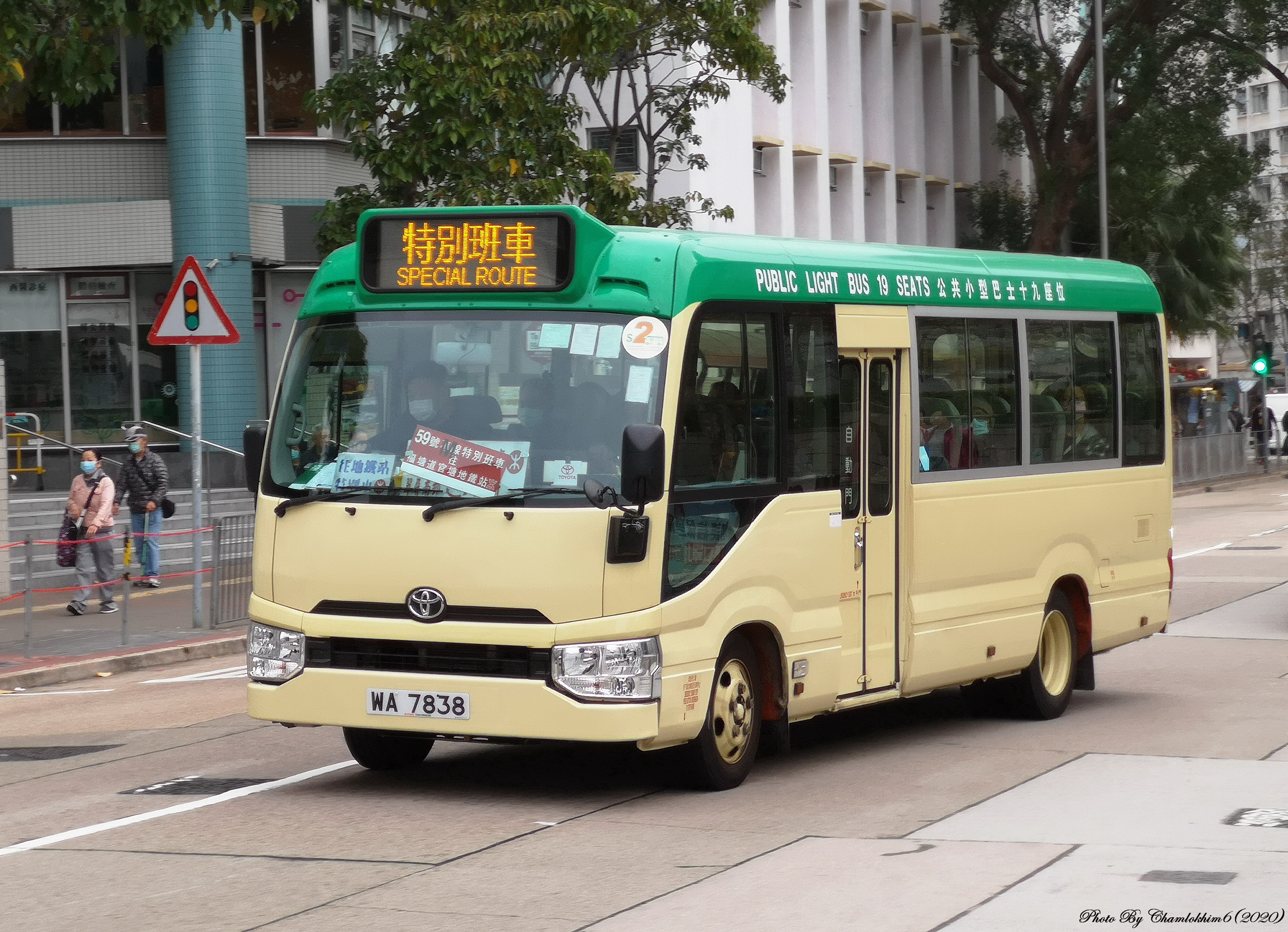 中文（中国大陆）: 小巴WA7838的照片